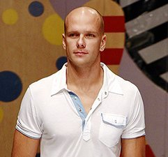 Brazilian swimmer Fernando Scherer.